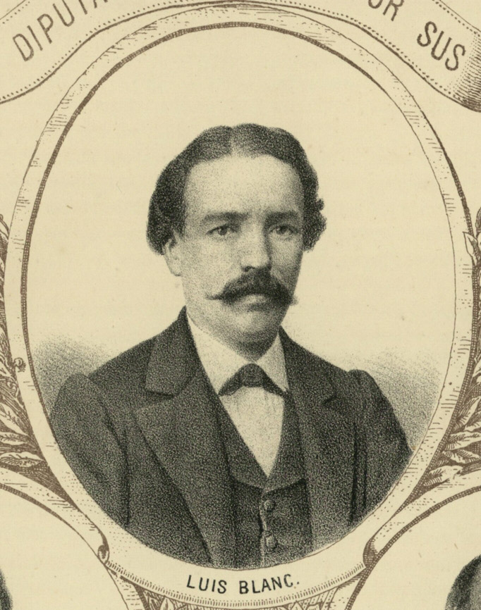 Luis Blanc, Eusebio Jimeno, Francisco Javier Moya, Cipriano Segundo Montesino. Litografía de Santiago Llanta para "Los diputados pintados por sus hechos. Colección de estudios biográficos sobre los elegidos por el sufragio universal en las constituyentes de 1869 recopilados por distintos literatos", t. I, Madrid, R. Labajos y Compañía editores, 1869.